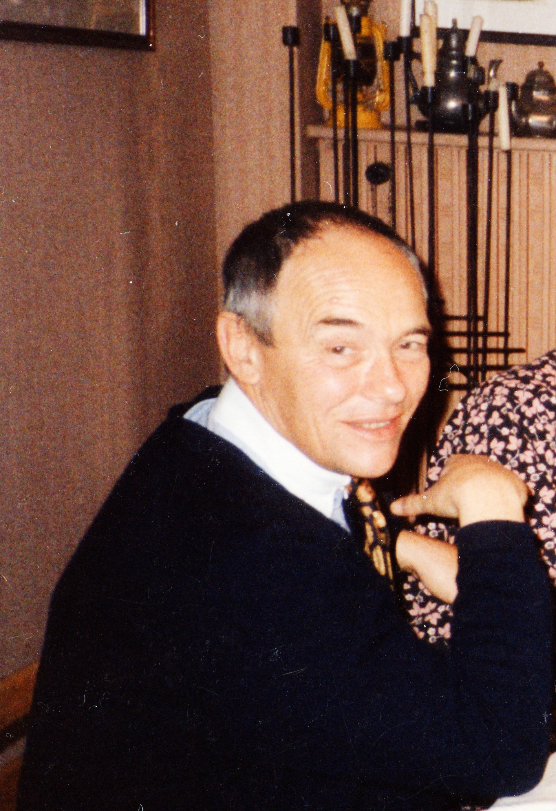 Franciszek Starowieyski na prywatnym spotkaniu we Francji